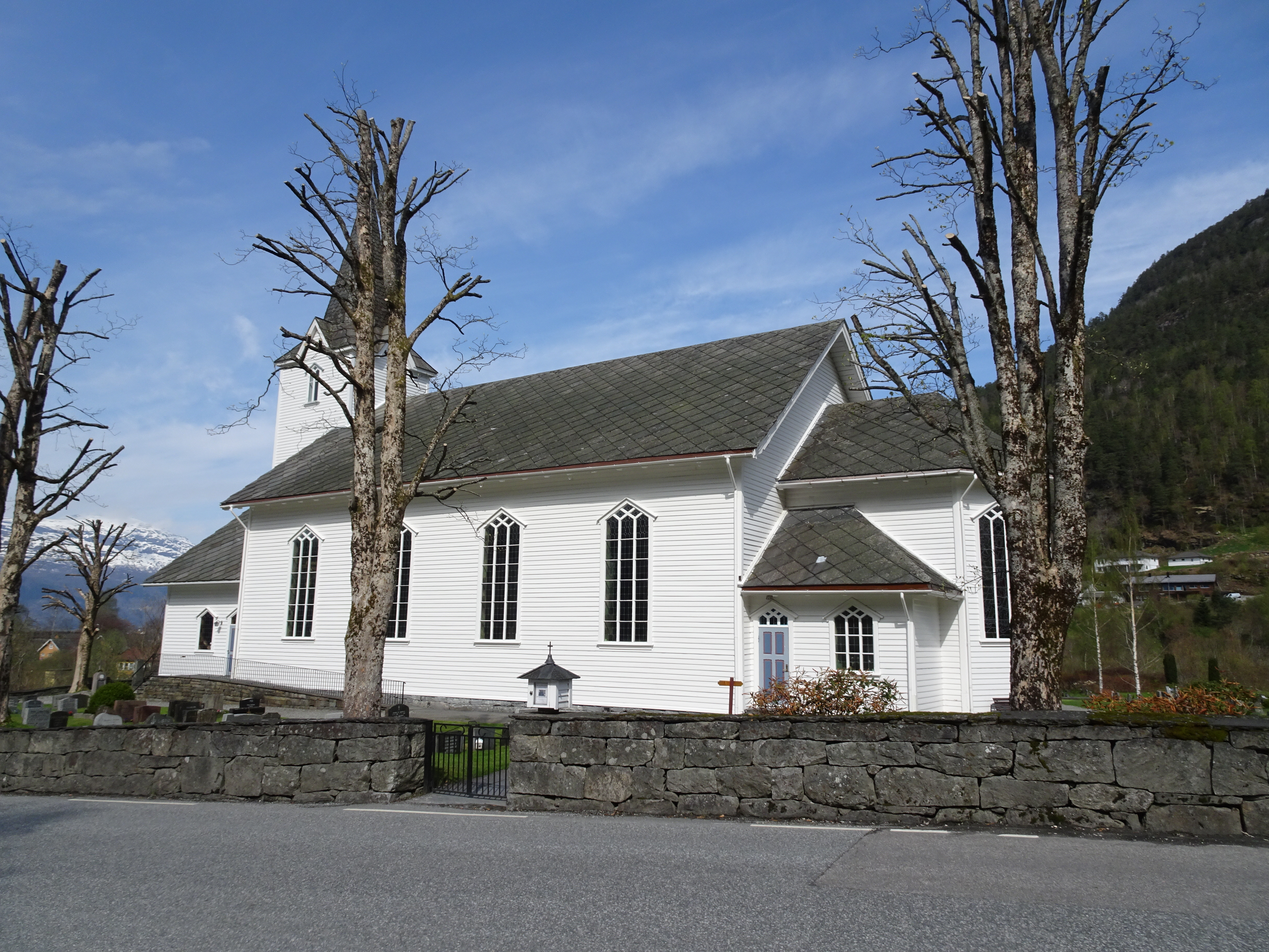 Jondal kirke med fylkesvei 105 i forgrunnen